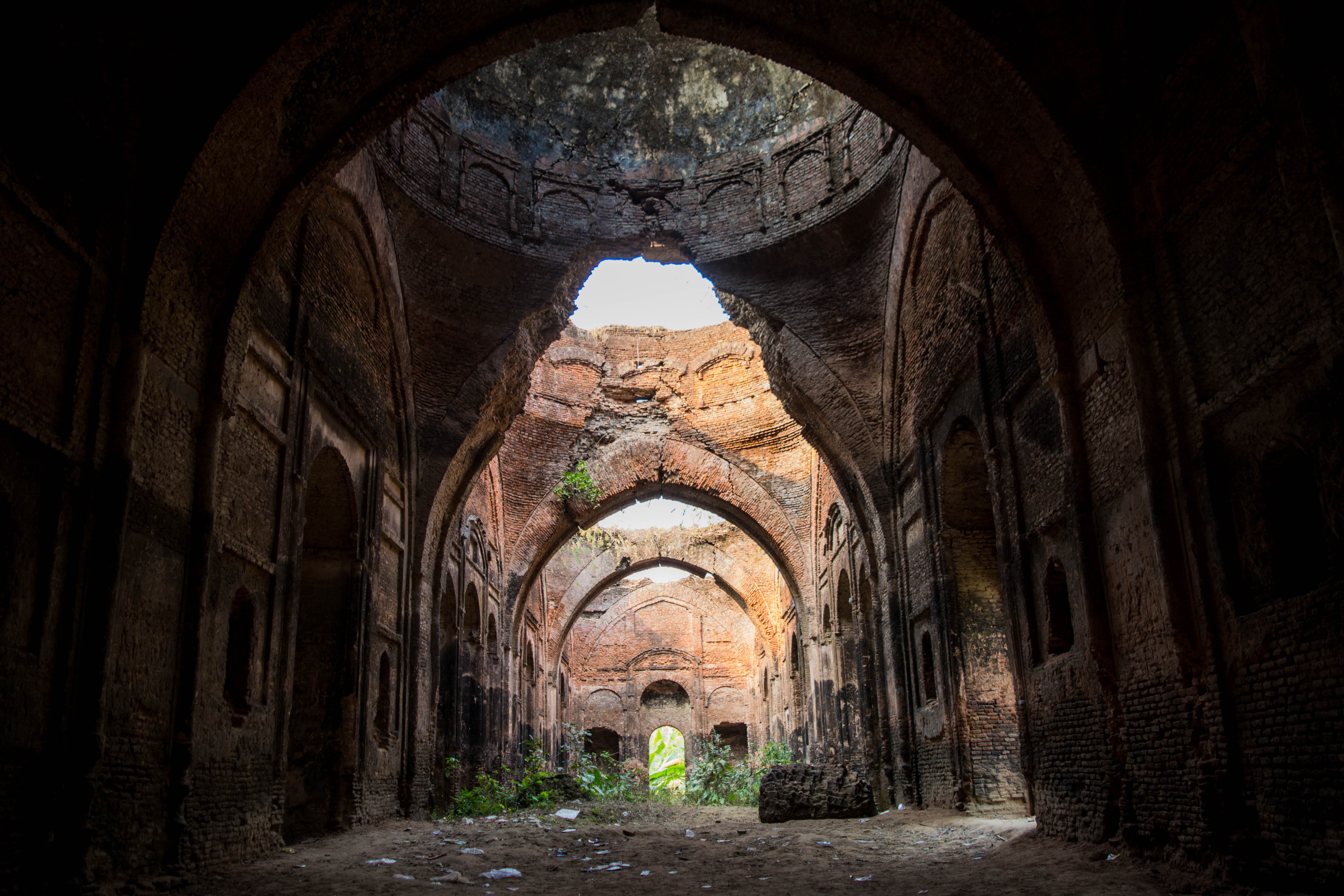 ফুটি মসজিদ captured by soumen jana